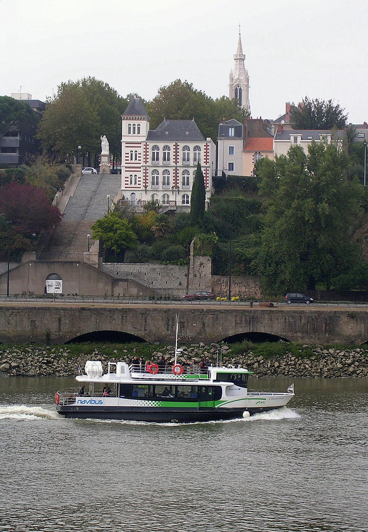 Le Chantenay en direction de Nantes, passage devant la butte Saint-Anne (musée Jules Verne)